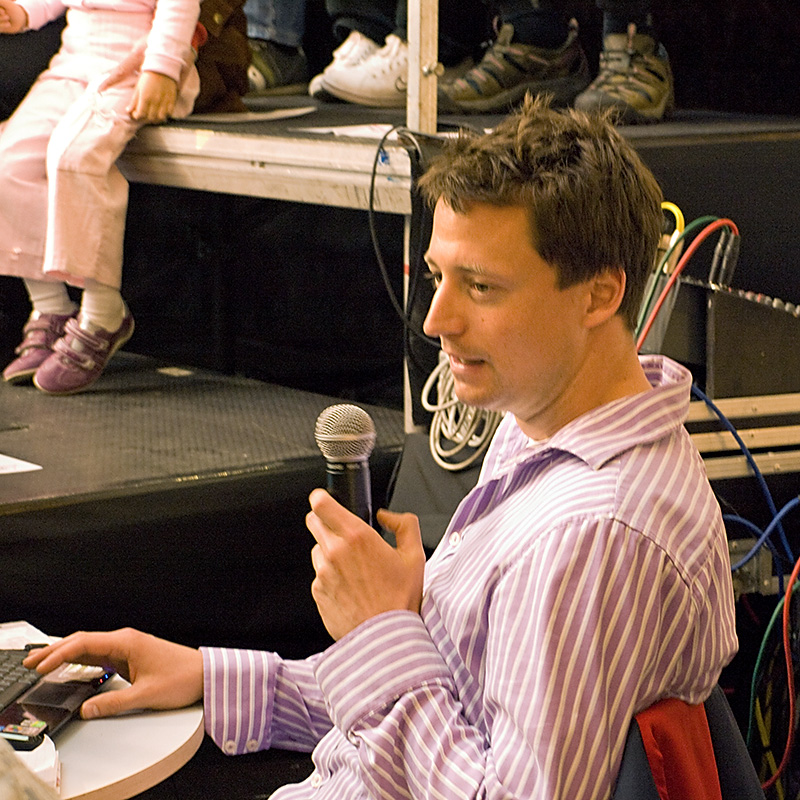 Jan Smetana při moderování exibice squashe v pražském obchodním Centru Chodov